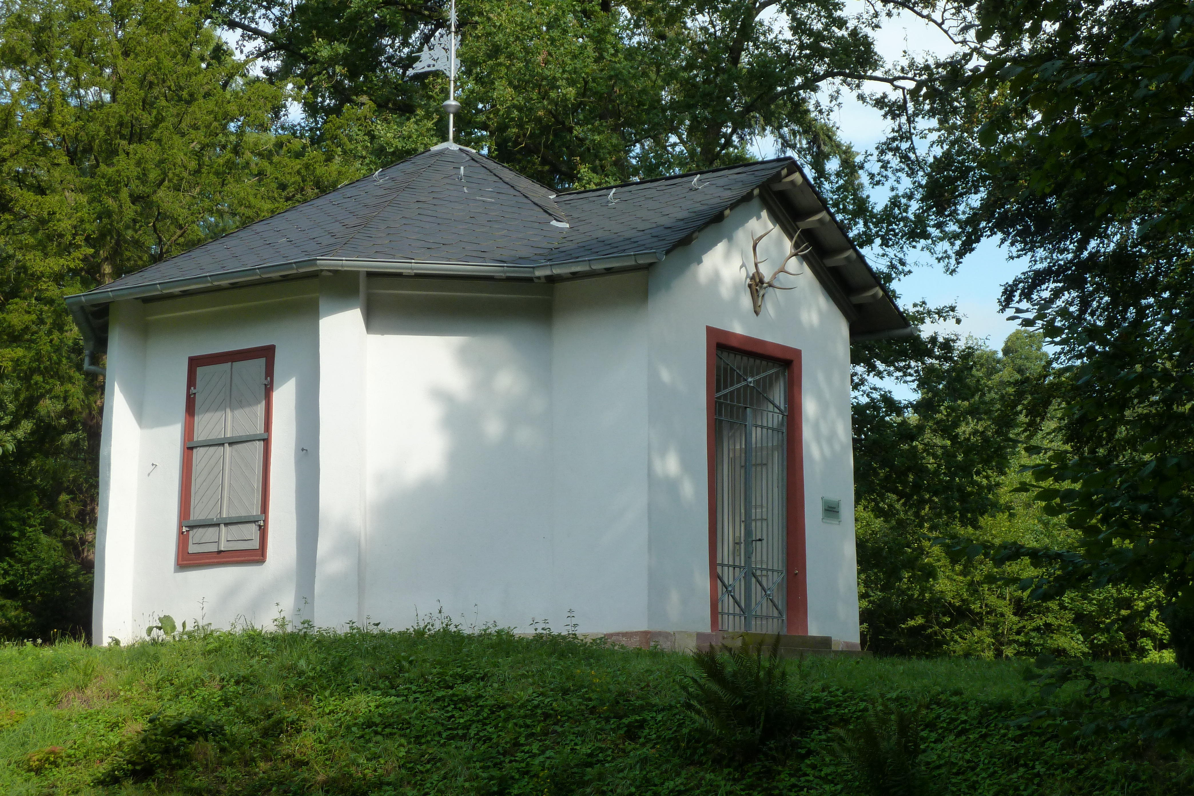 Dianaburg in Darmstadt-Arheilgen